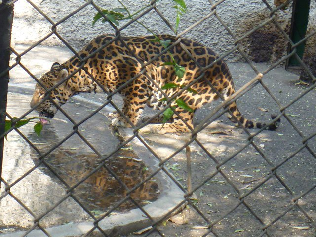 jaguar en cautiverio en el aviario el nido de Ixtapaluca